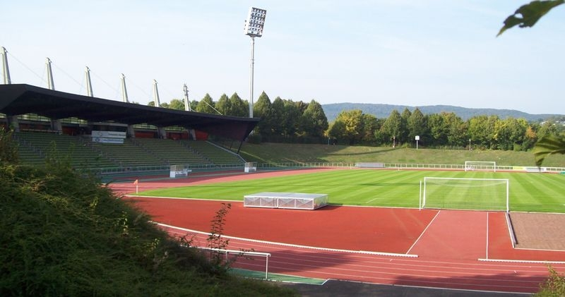 Parkstadion Baunatal